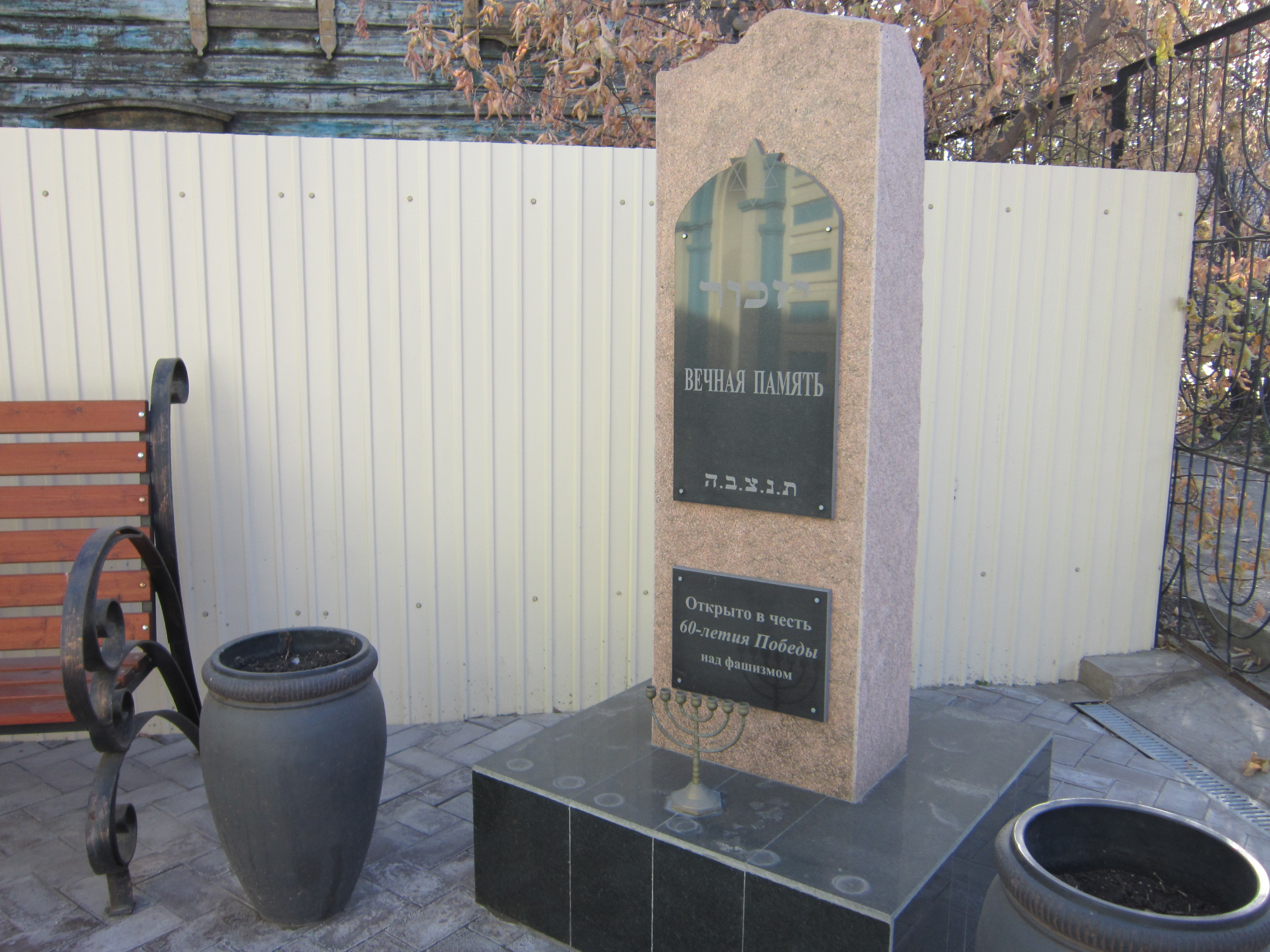 Памятник жертвам фашизма во дворе Иркутской Синагоги